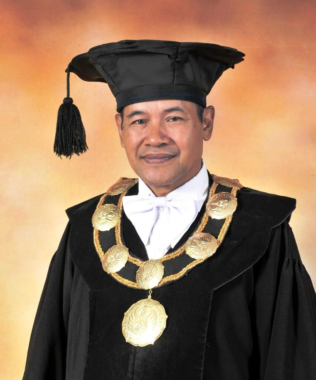 Prof. Dr. Marsigit, M.A. adalah guru besar pendidikan matematika Universitas Negeri Yogyakarta yang saat ini menjabat sebagai Direktur Program Pascasarjana Universitas Negeri Yogyakarta.